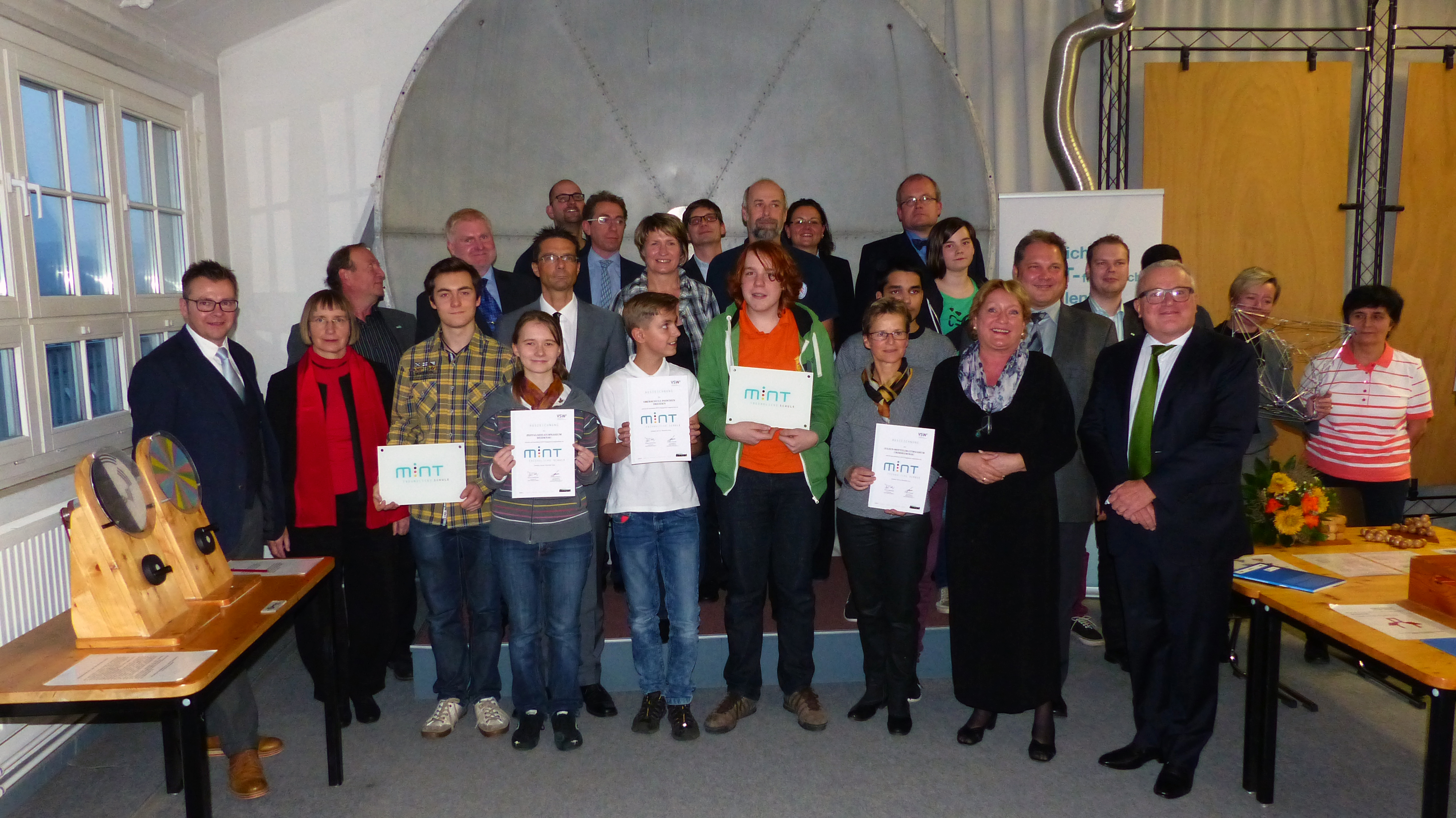 Preisverleihung im Rahmen der Wirtschaftsinitiative "MINT Zukunft schaffen" in Sachsen 2014 in den "Technischen Sammlungen Dresden" am 24.11.2014